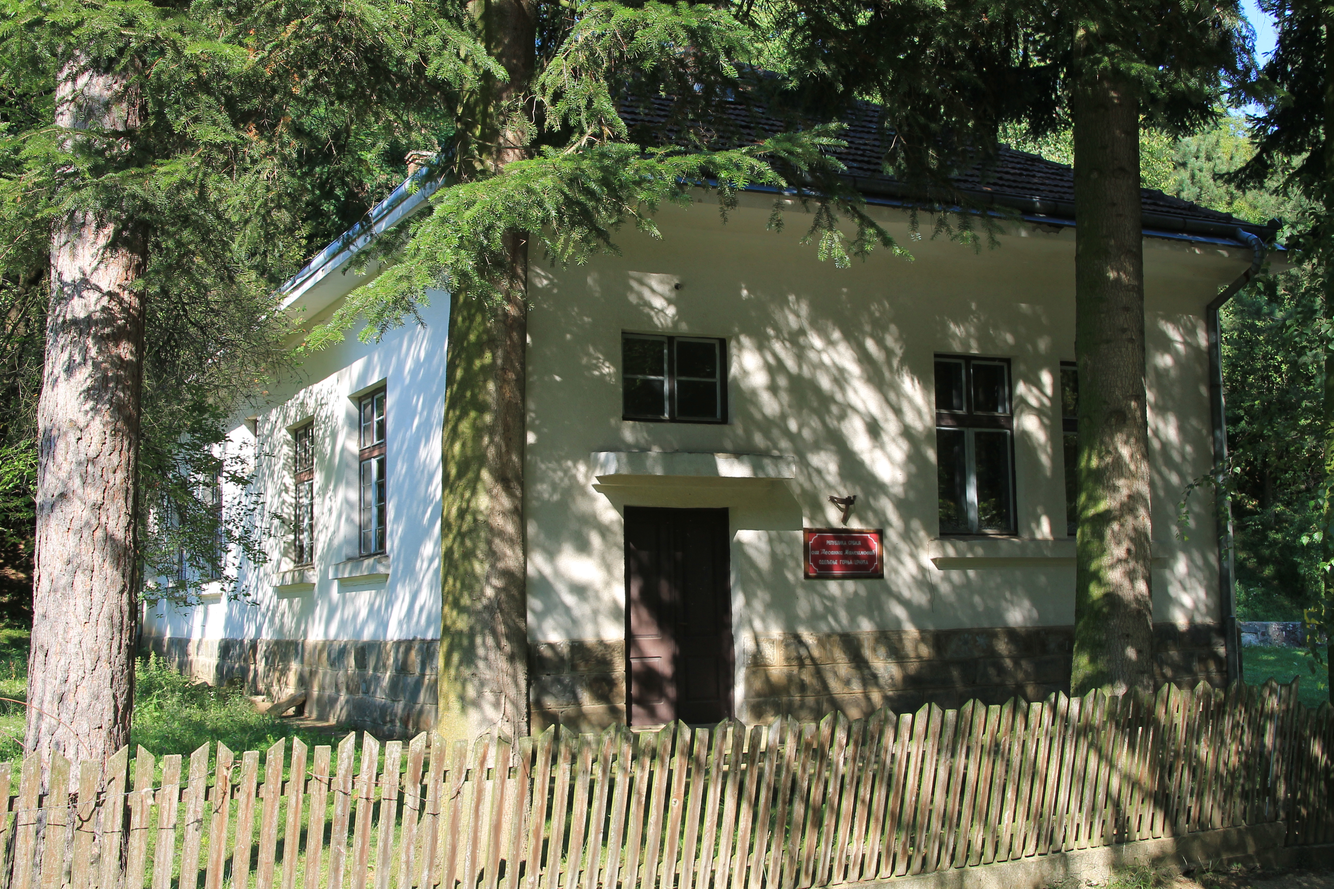 Zgrada škole